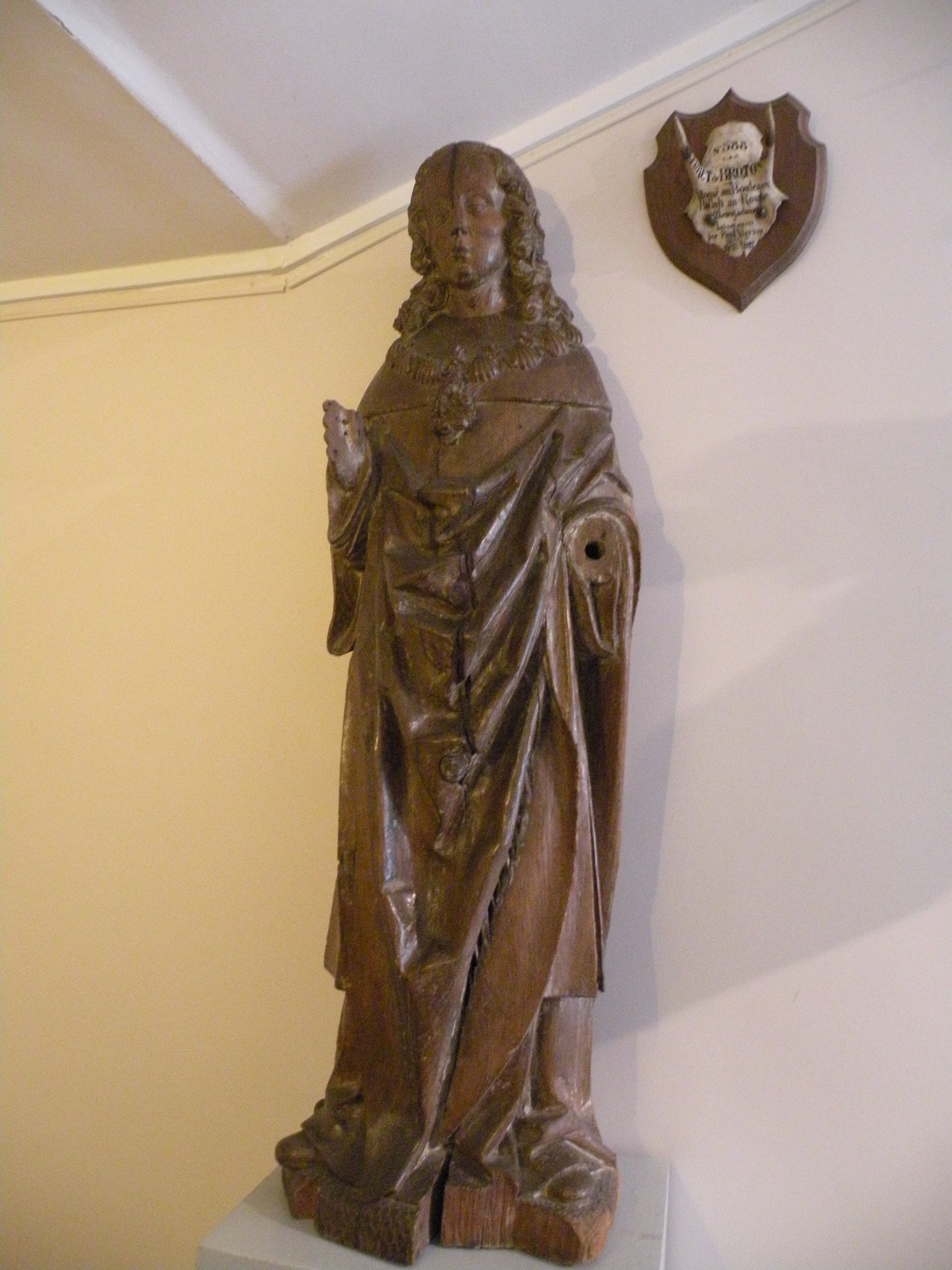 statue en bois de Louis XII en costume de sacre du XVIe siecle Musée de la Vénerie (Senlis)